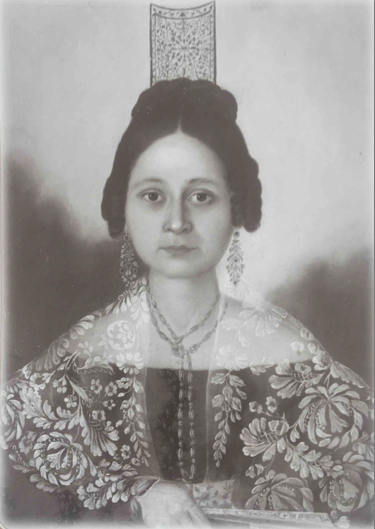 Álbum de Ignacio Triguero, Ma. Teresa Bermudez